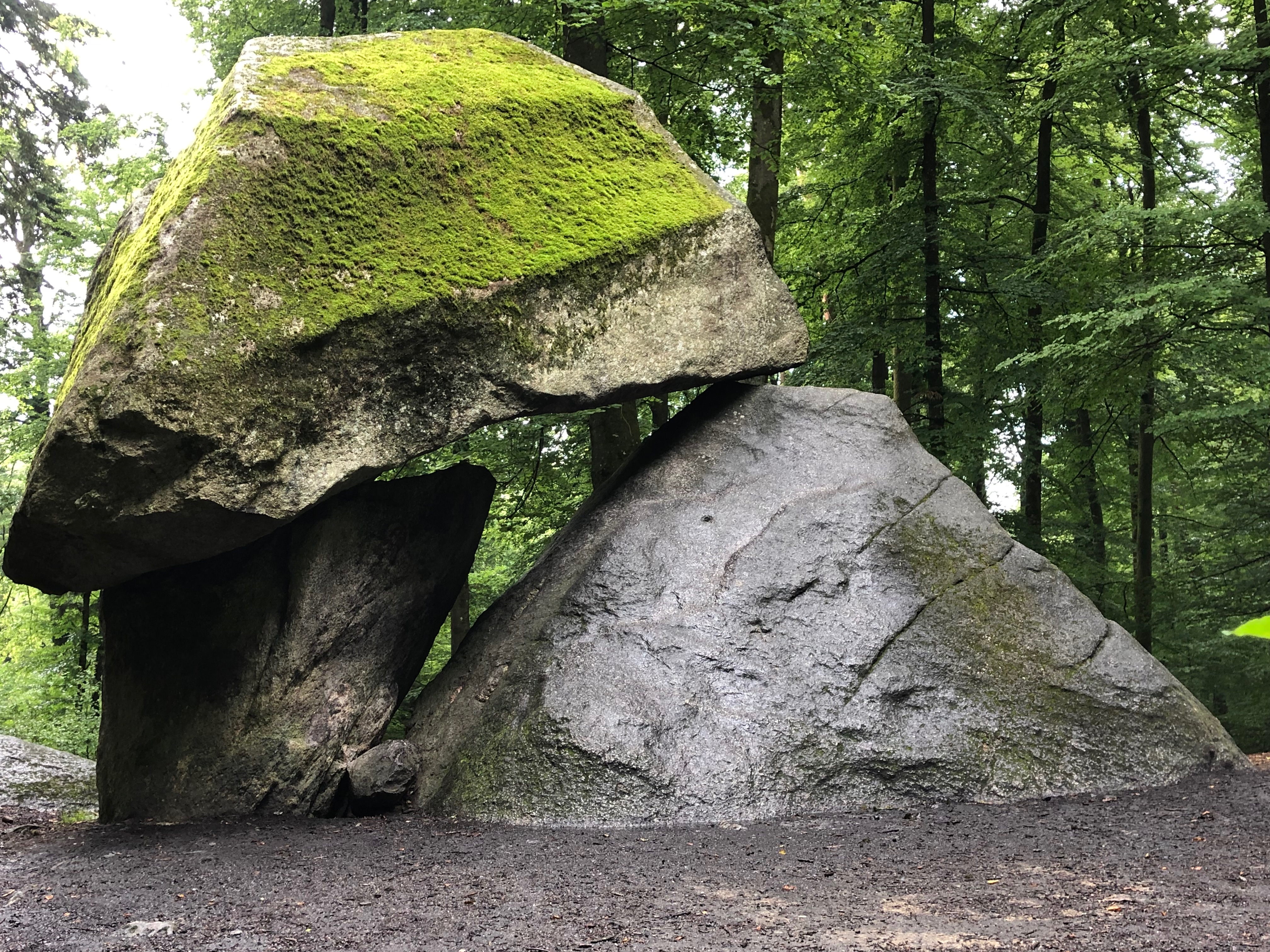 Erdmannlistein